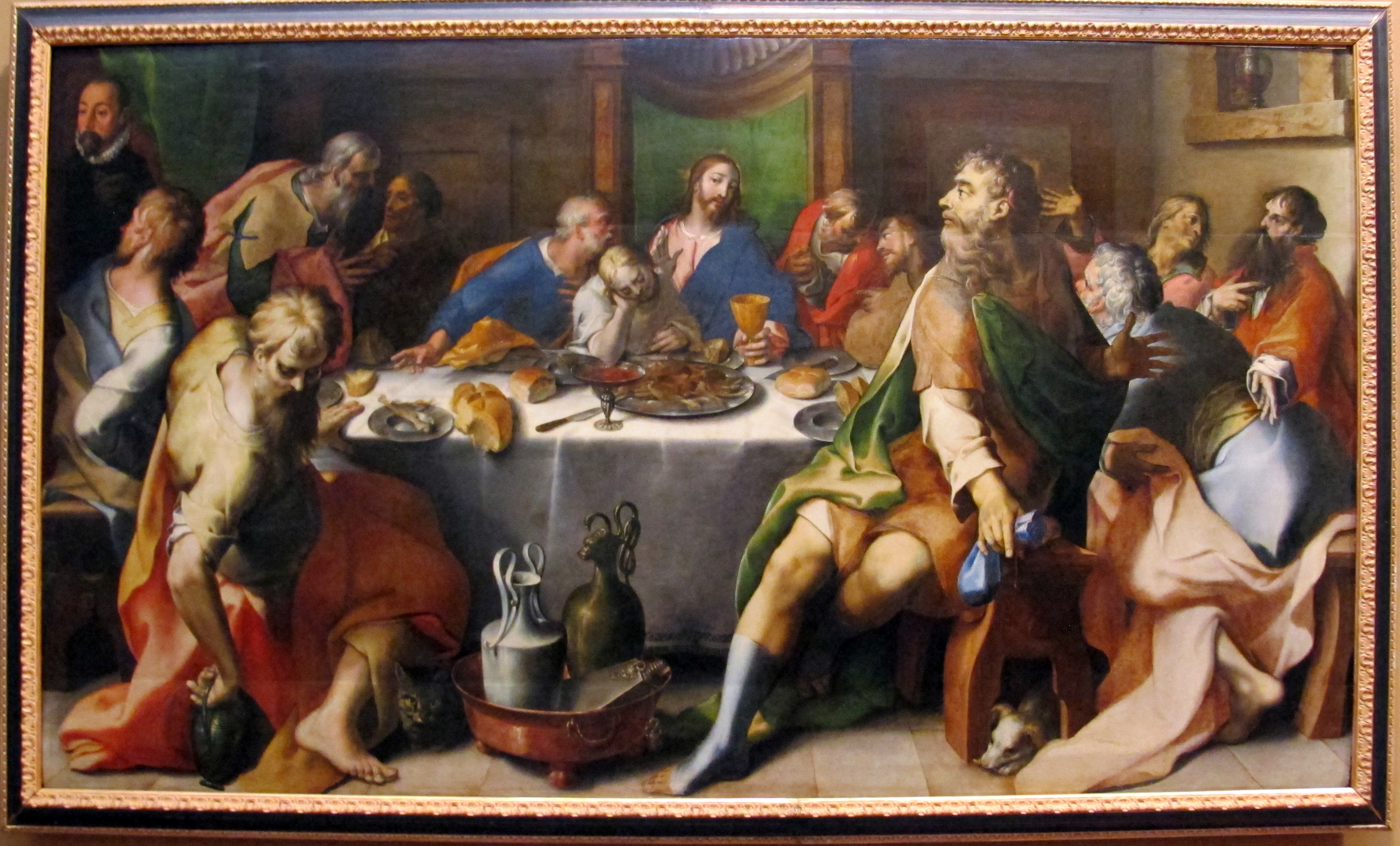 Galleria Farnese (Museo di Capodimonte)